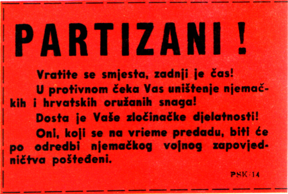 Srpskohrvatski / српскохрватски: Letak koji su Nemci bacali partizanima iz aviona, uoči bitke na Sutjesci. Na pozadini je pisalo: "Ovaj letak vriedi kao propustnica" na hrvatskom i na nemačkom.